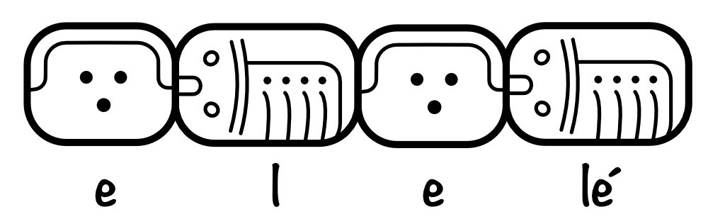 De Landa alphabet